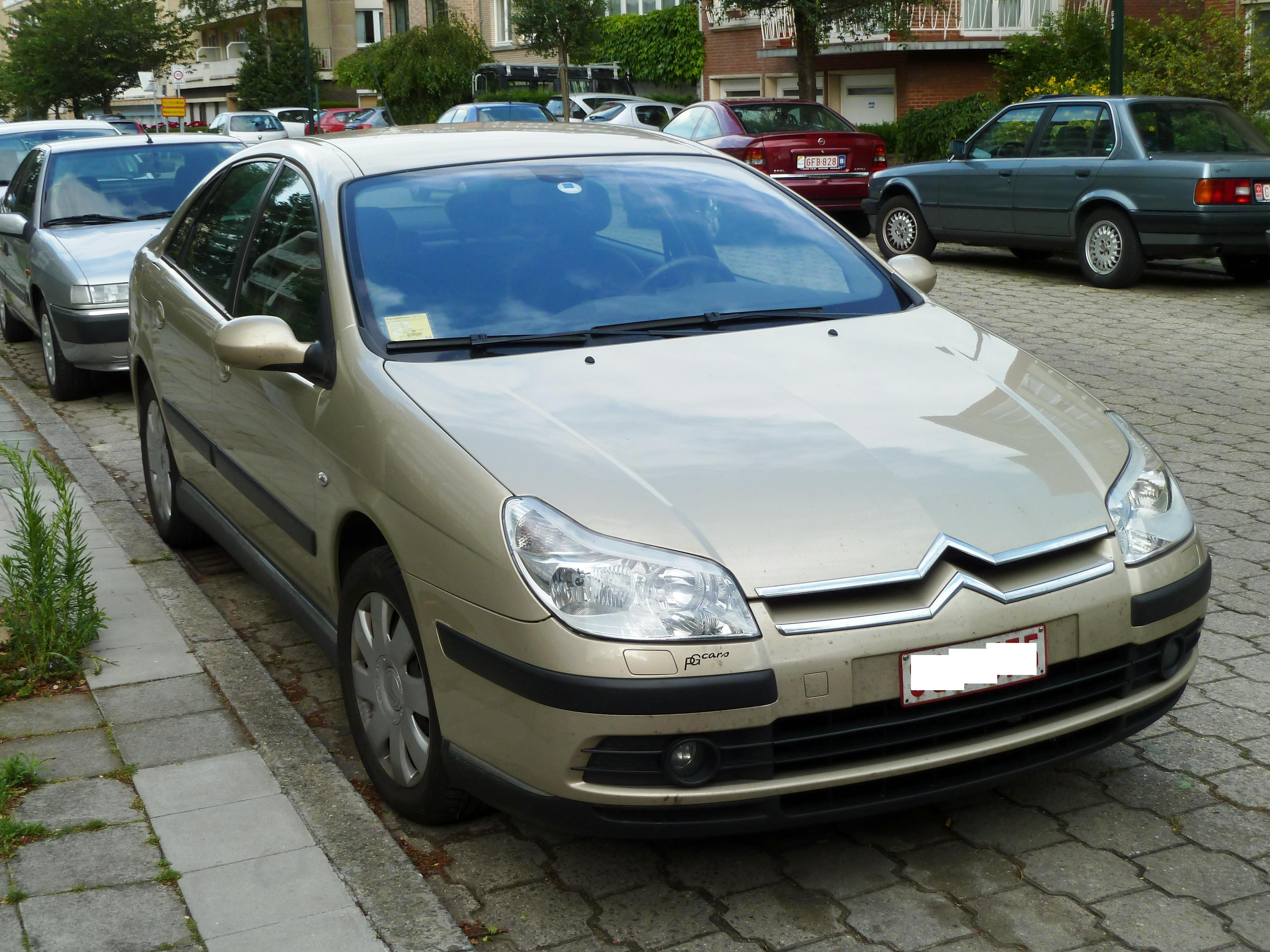 C5 Mk1 Phase II